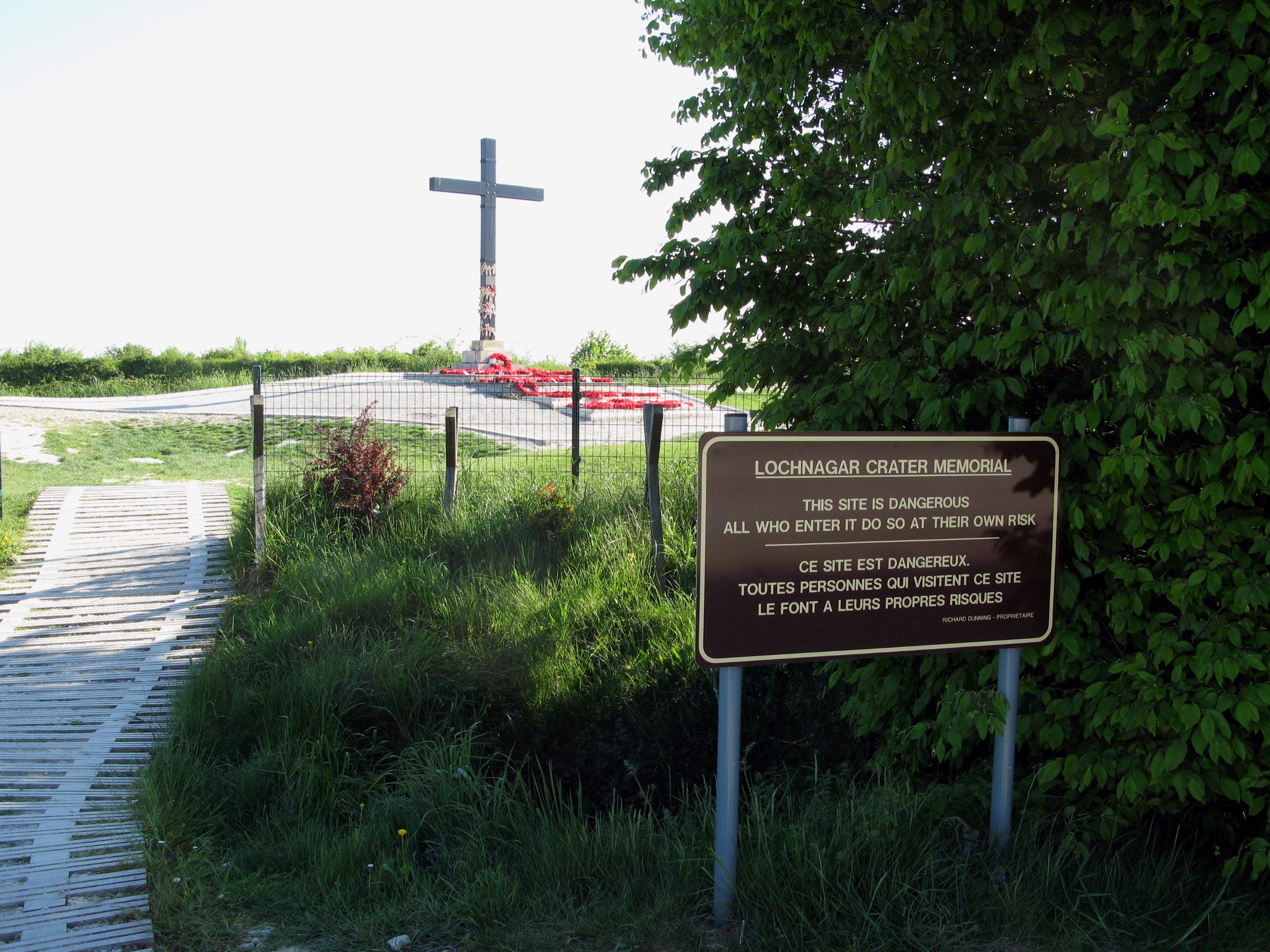 Ovillers-la-Boisselle (Somme, France) Panneau à l'entrée du trou de mine "Lochnagar Crater" et la croix faisant office de mémorial. .